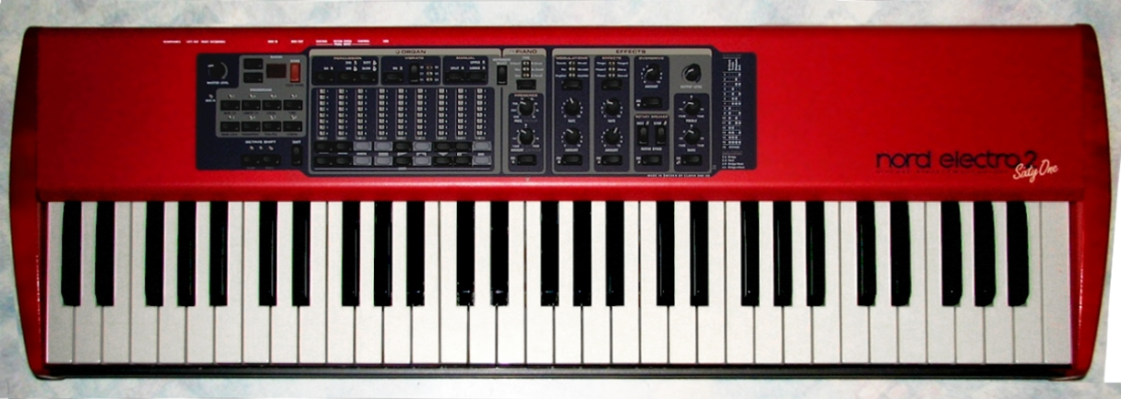 Clavia Nord Electro 2 61 keys